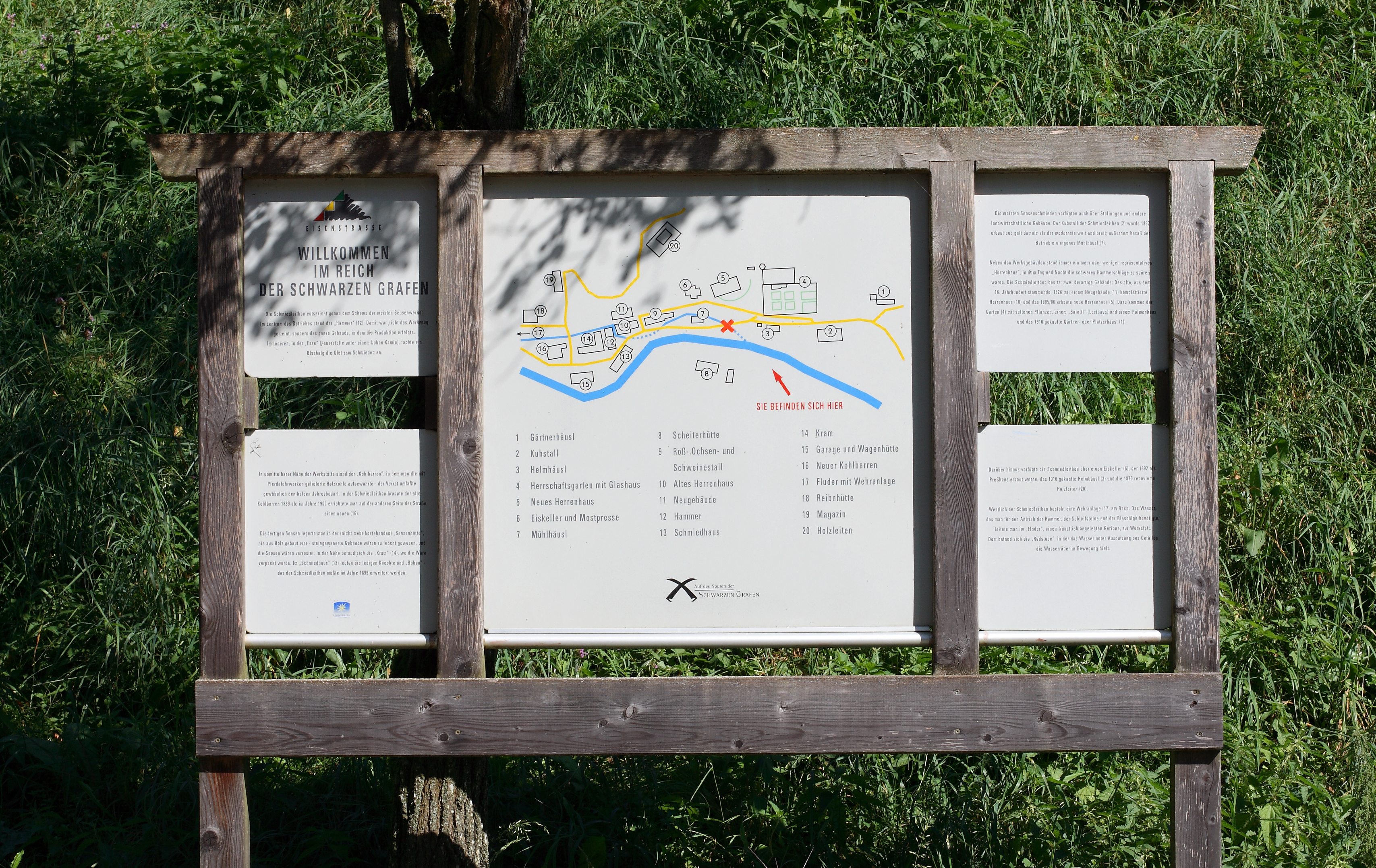 Infotafel im Freilichtmuseum Schmiedleithen (Grünburg, Oberösterreich)